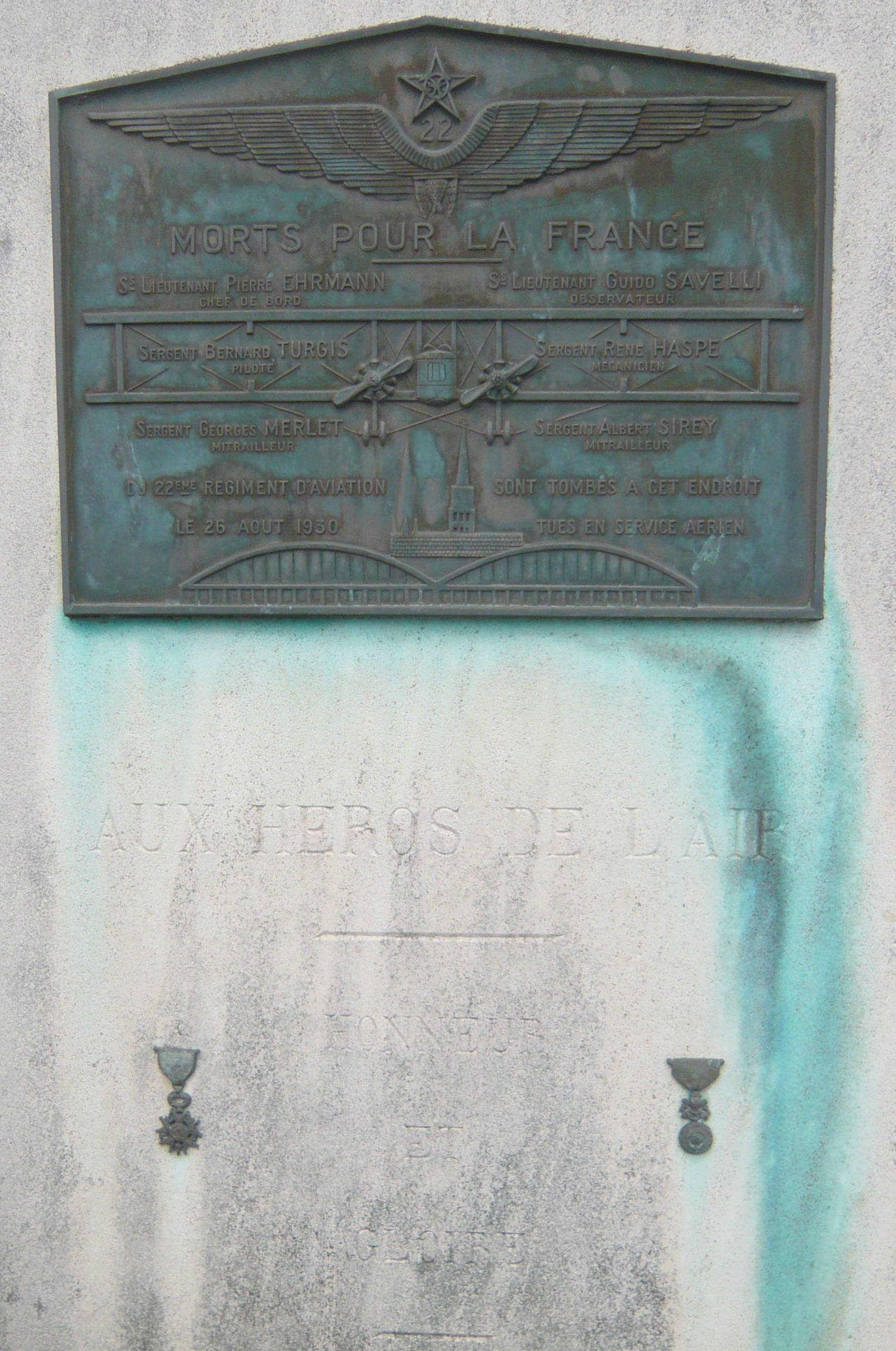 Stèle "Morts pour la France" 26 août 1930, 66 route de Chavannes Lèves, Eure-et-Loir (France).